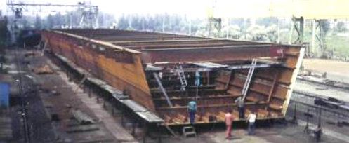 Deák Ferenc híd hegesztett hídeleme